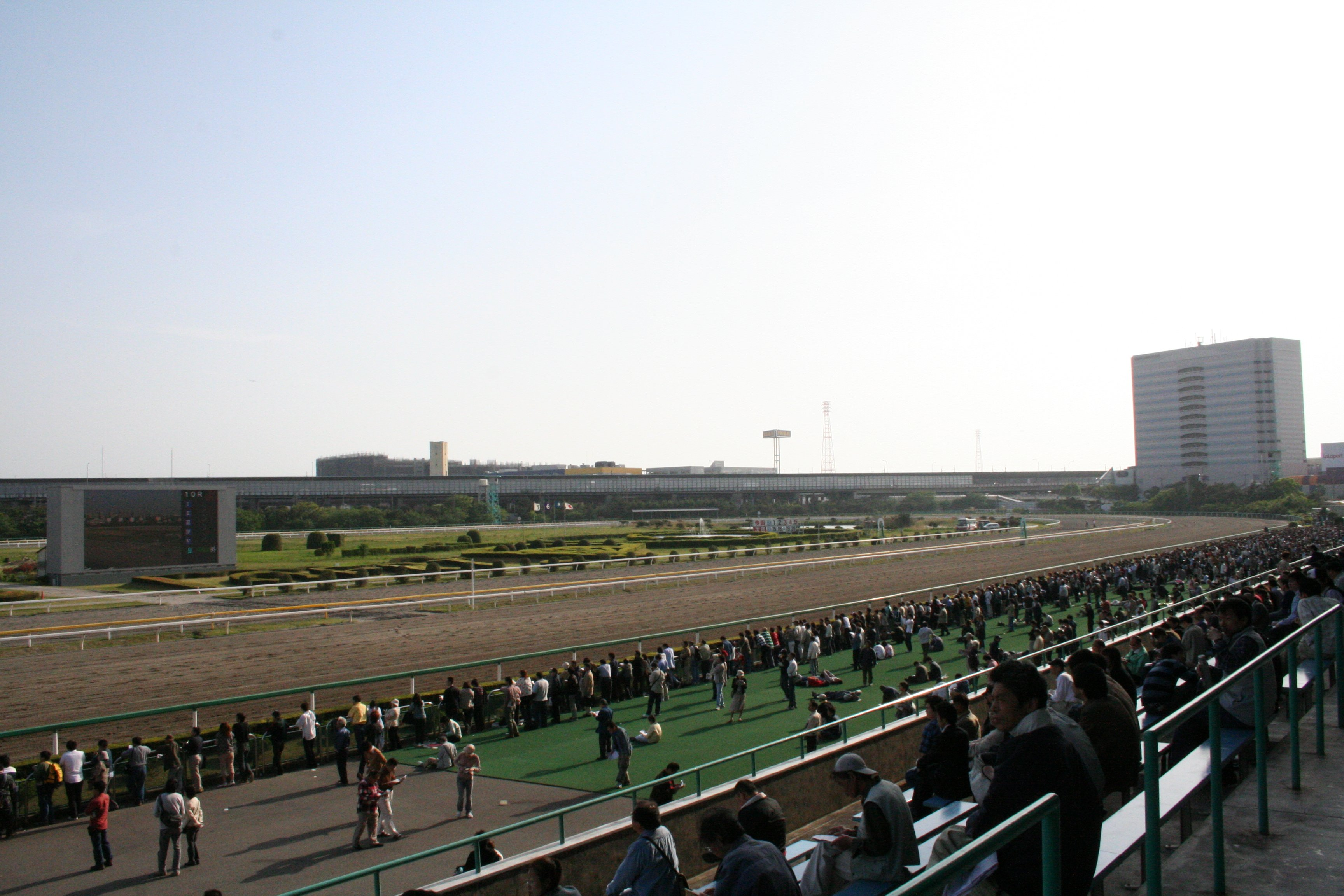 船橋競馬場 コース遠景 撮影日：2006年5月5日 撮影者：Goki